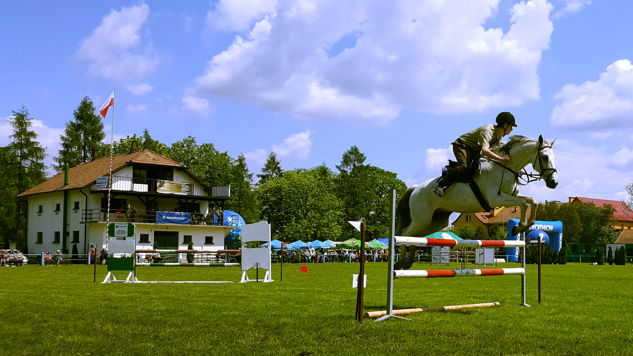 Klikowska Ostoja Polskich Koni w Tarnowie